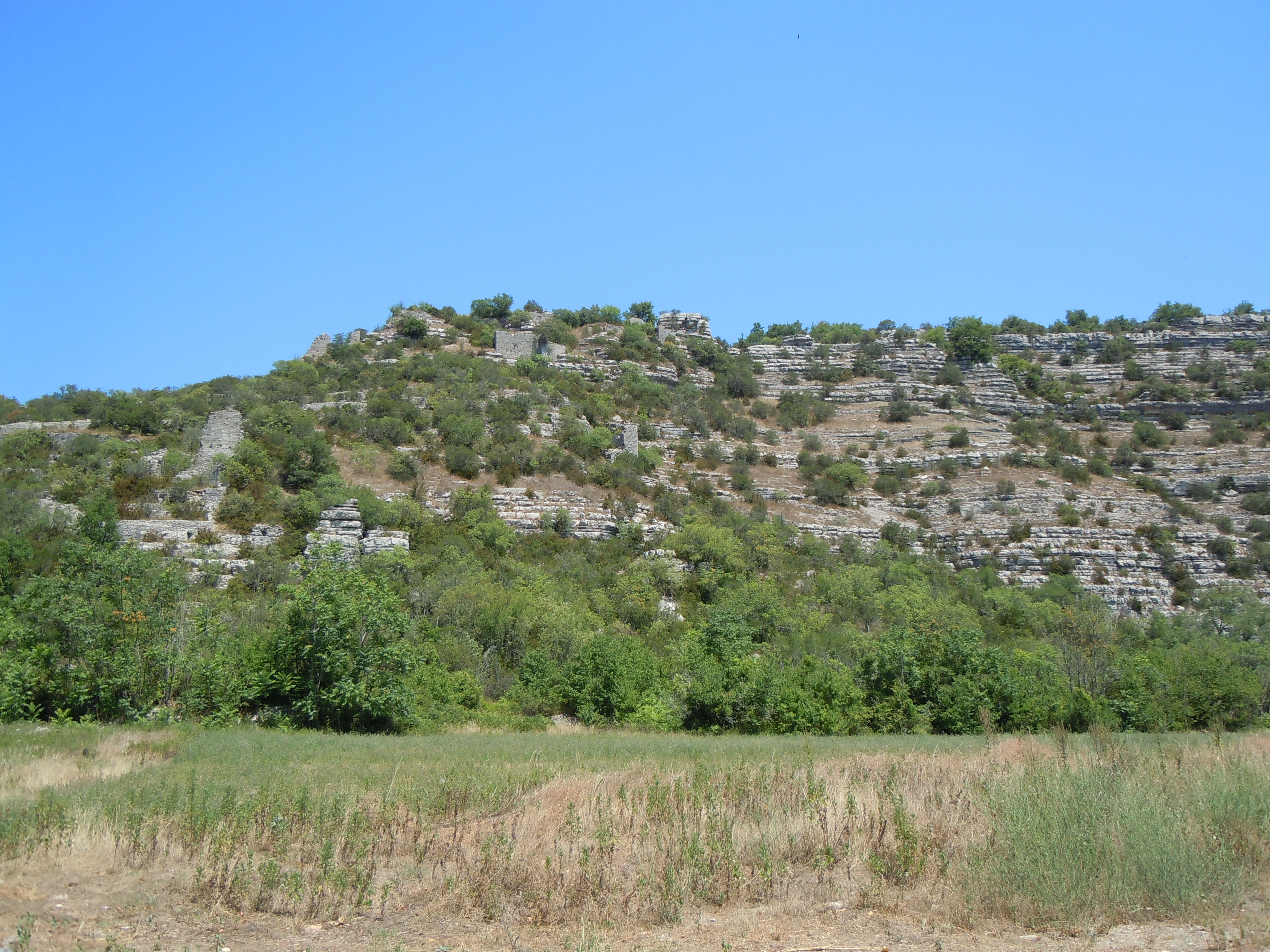 Cornilhon ou Cornillon - Village abandonné dans les Gorges du Chassezac - Les Assions - Ardèche- France